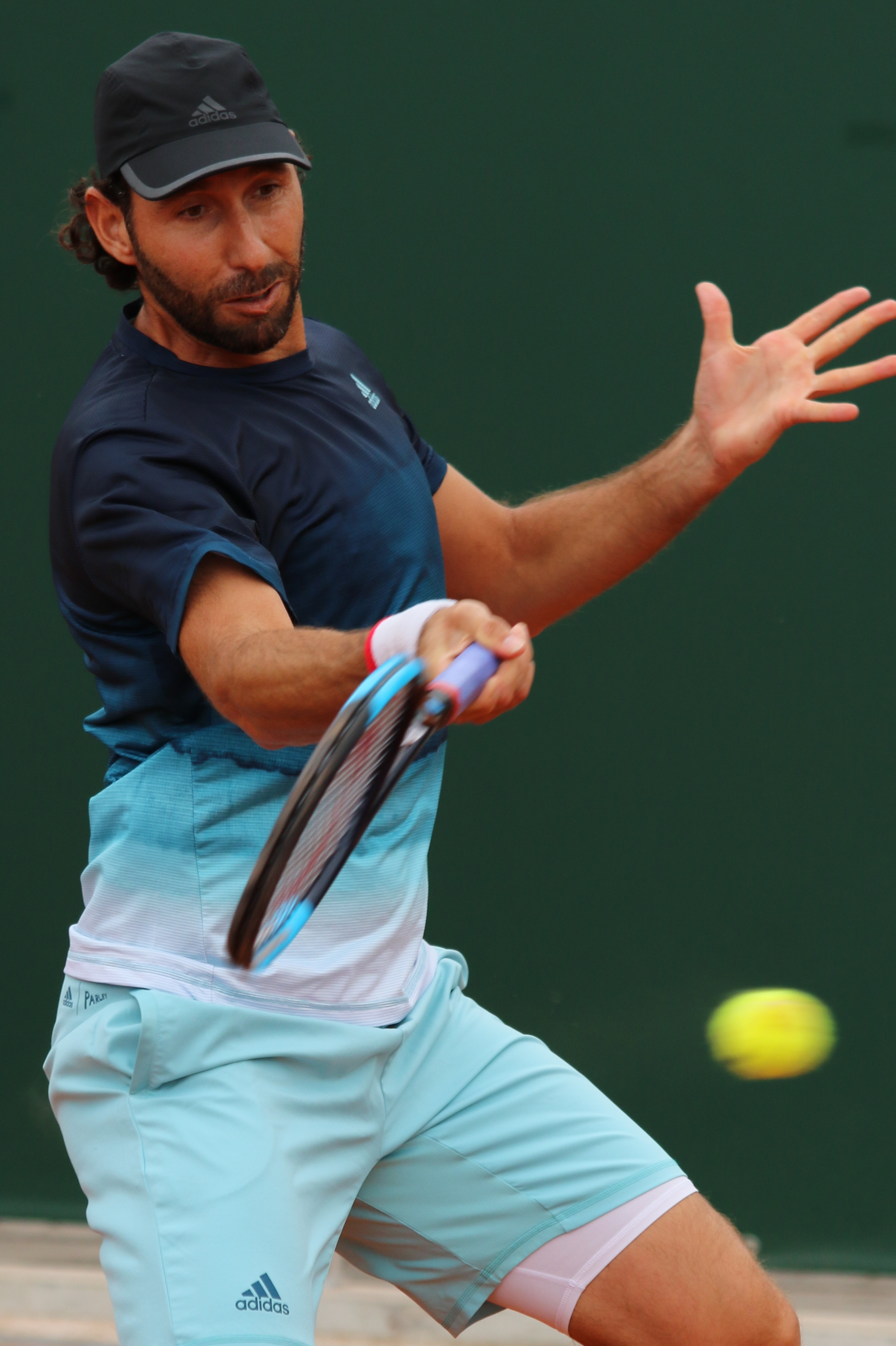 Gonzalez S. RG19 (39)